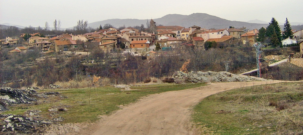 Sujet: HS Panorama Source:Commons total iwwerschafft vum User:Cornischong